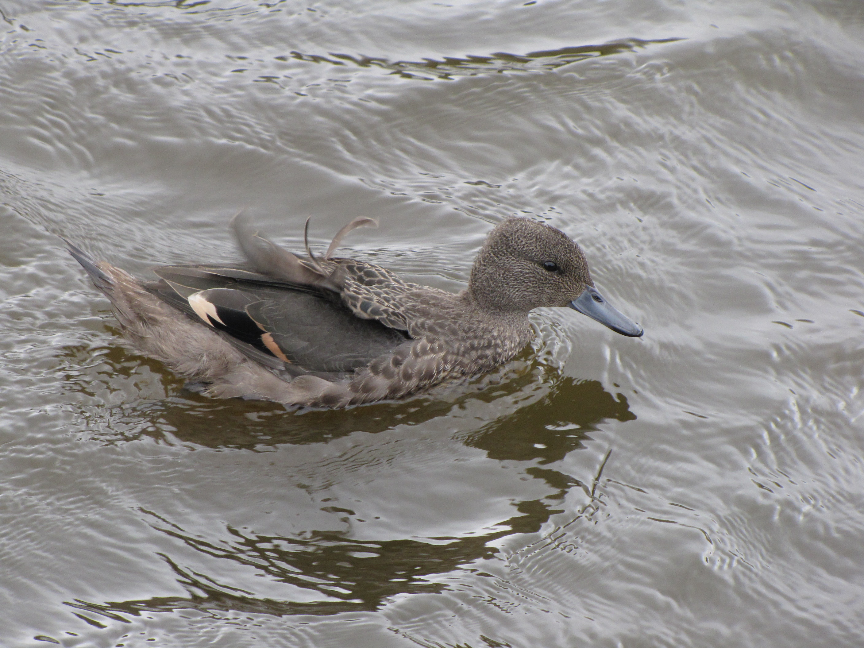 Anas andium (Pato paramuno)